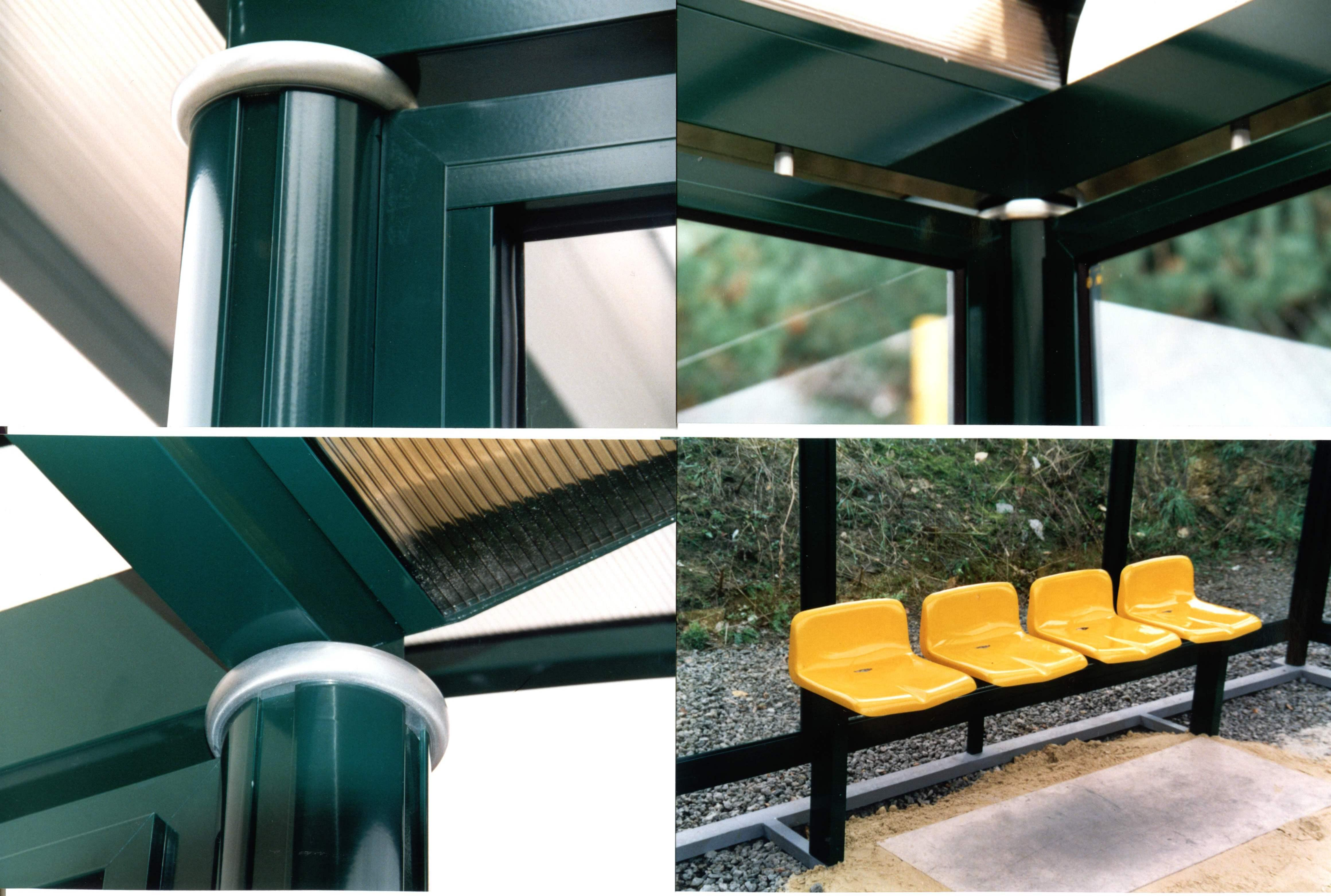 Urbi Zbliżenie na detale